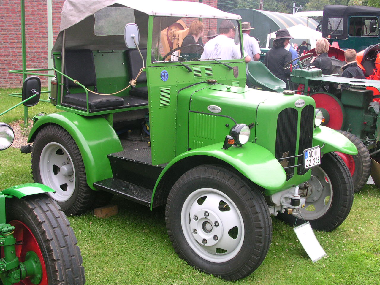 Kerkrade, Industrion, Zettelmeyer-Traktor Z2